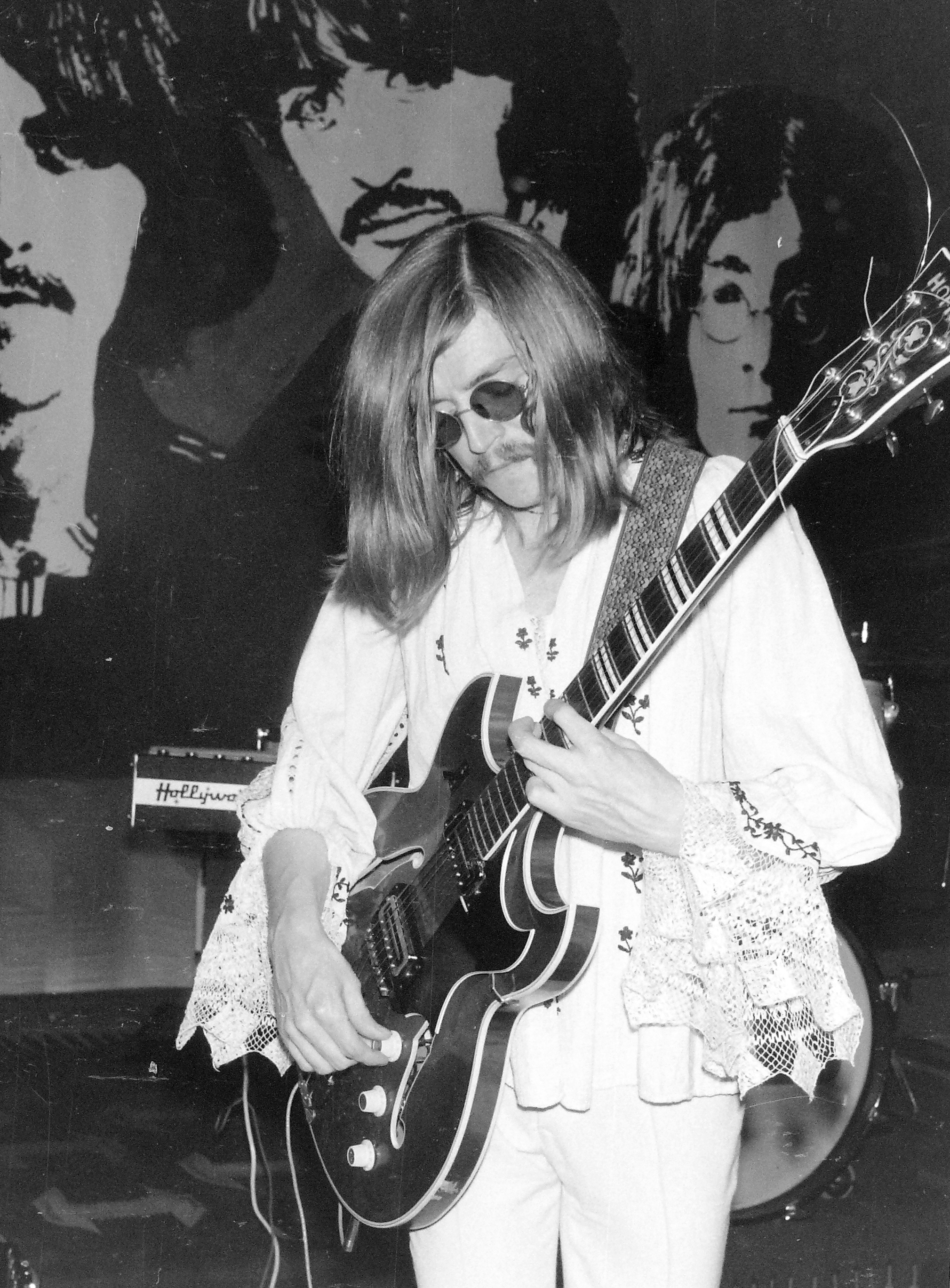 Szörényi Levente (Gmunden, Ausztria, 1945. április 26. –) Kossuth-díjas és Erkel Ferenc-díjas zeneszerző, gitáros, énekes, szövegíró